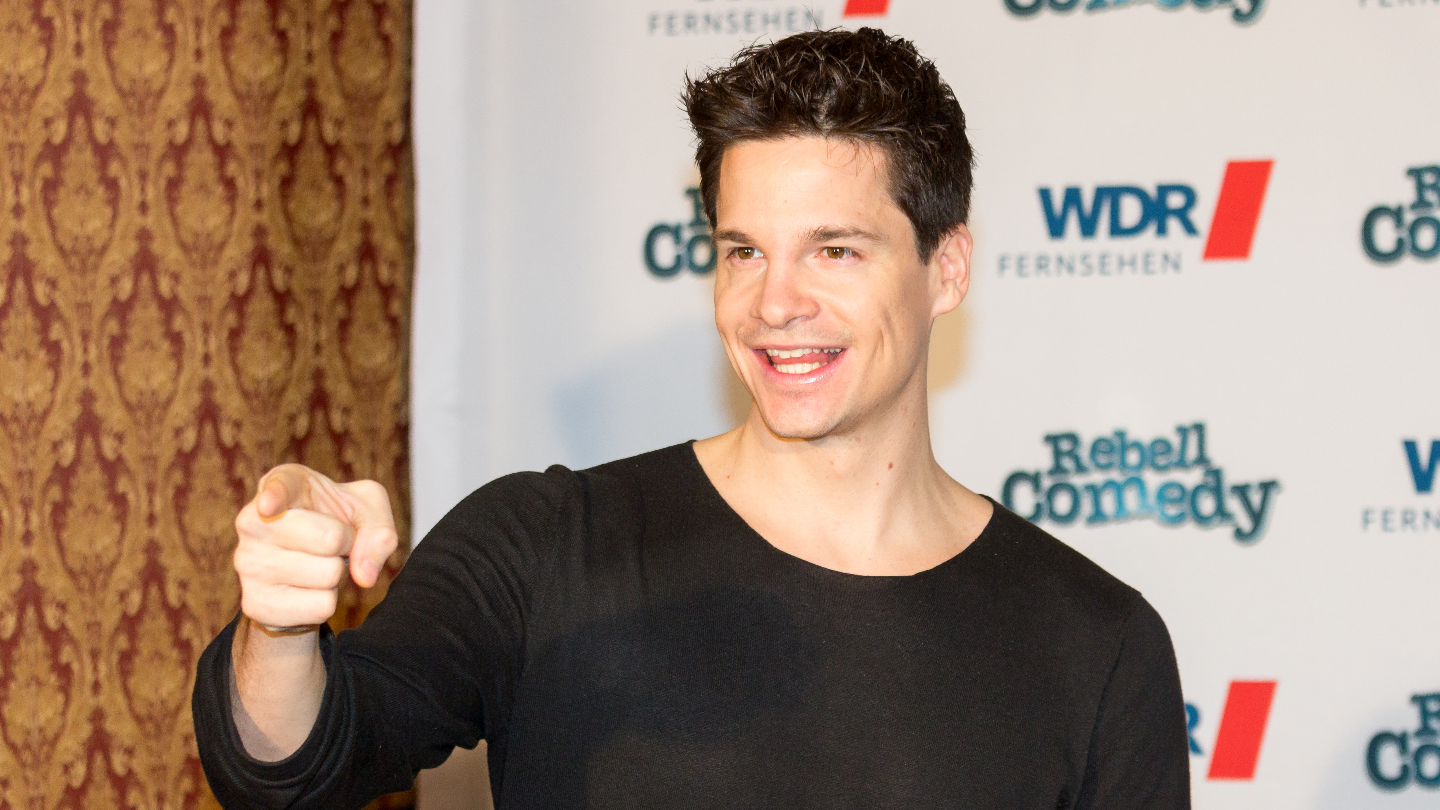 RebellComedy - WDR-Pressetermin im Gloria